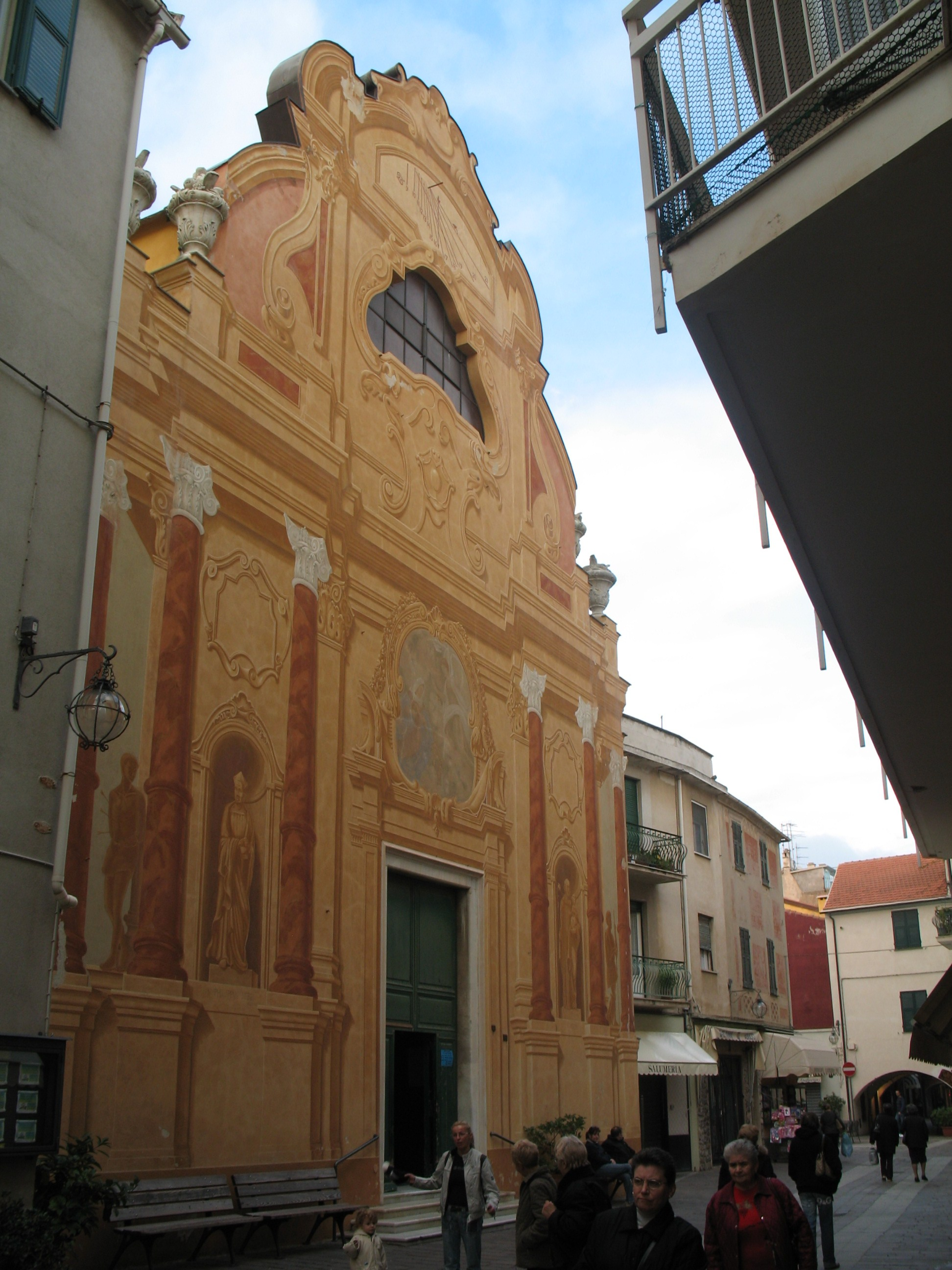 Serie di Immagini da Spotorno in provincia di Savona - Chiesa parrocchiale della SS. Annunziata